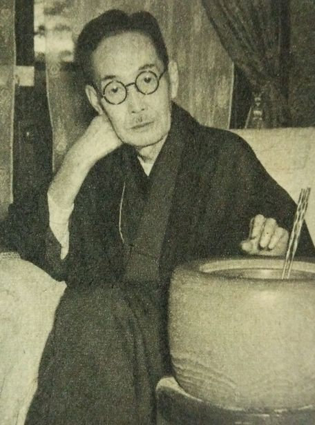 羽田亨